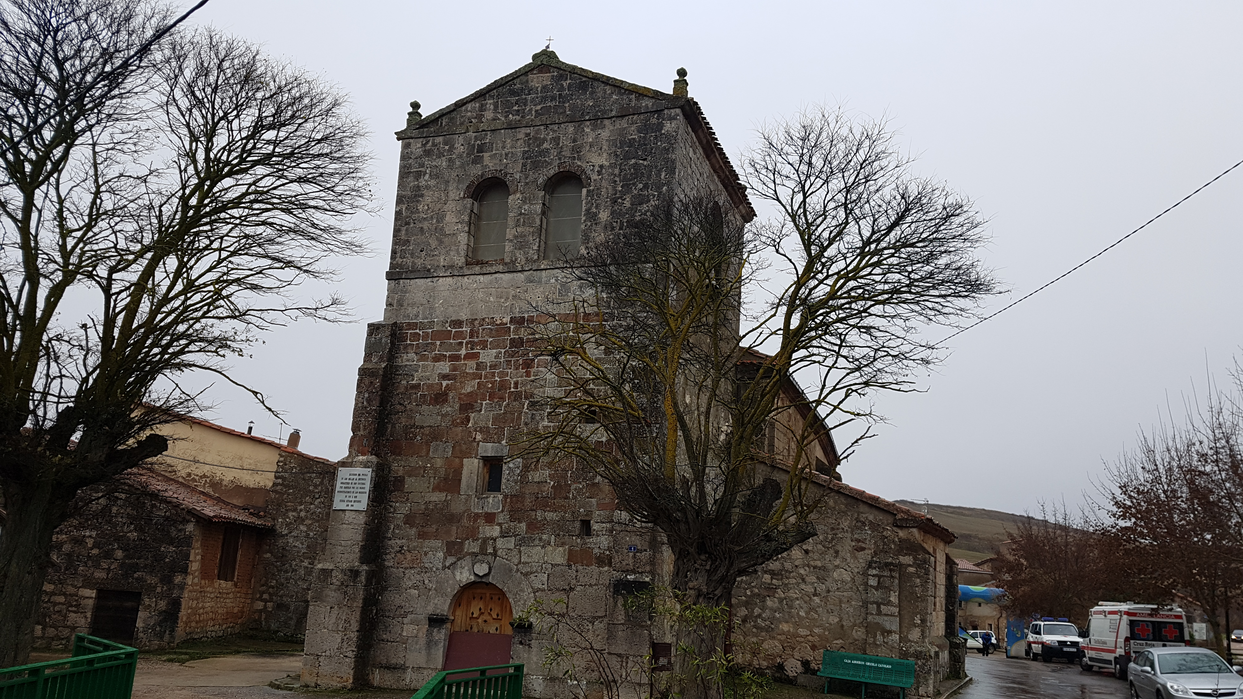 Fachada Principal de la iglesia de San Millán de Juarros (Burgos-España)